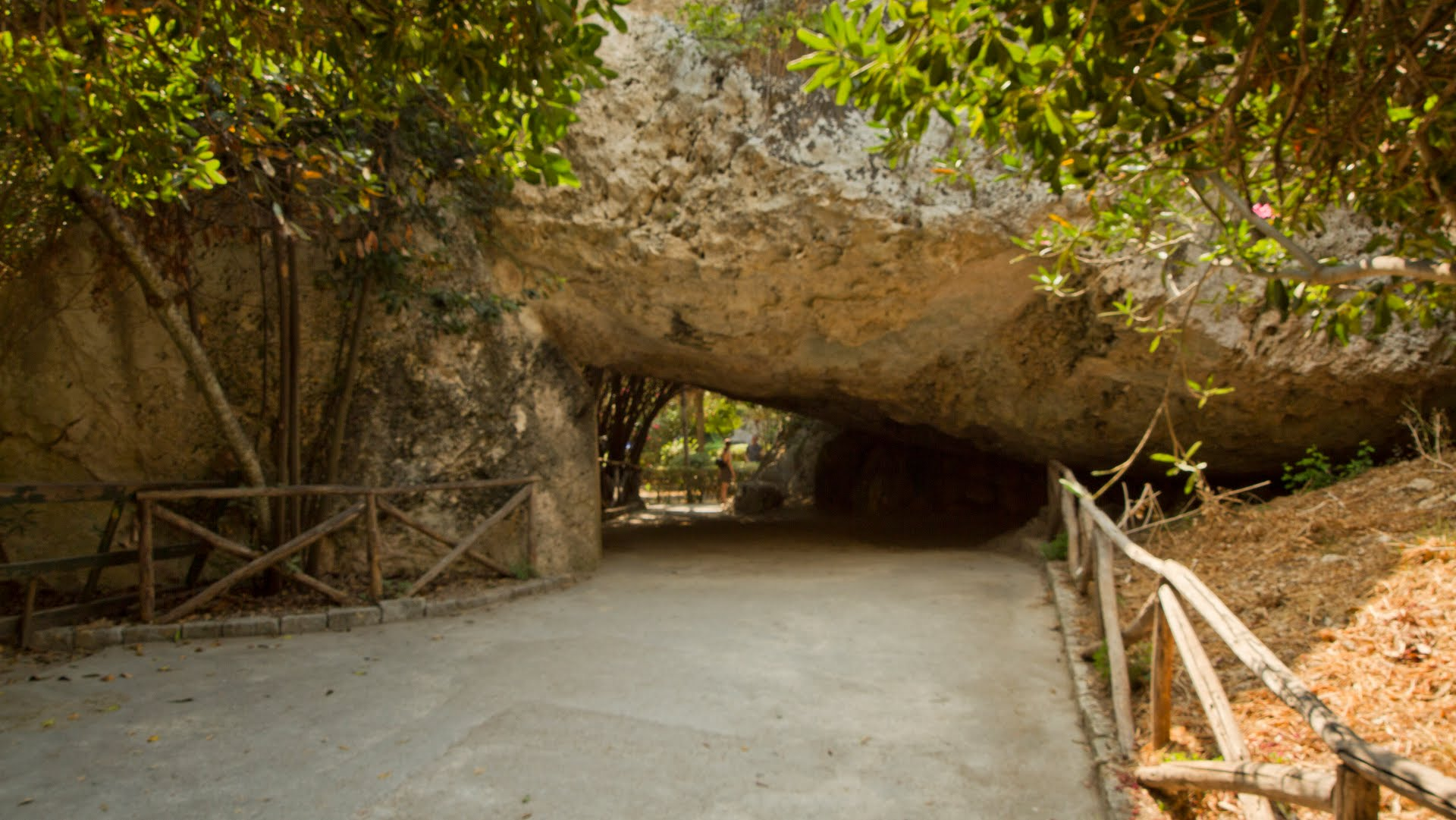 Parco Archeologico della Neapolis (Siracusa)